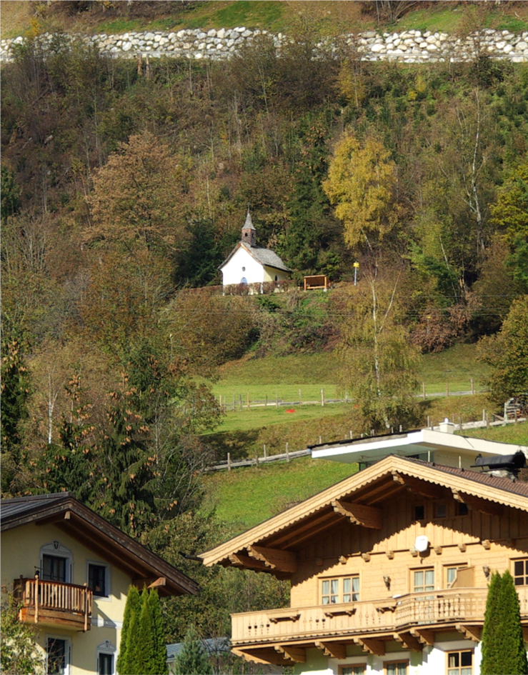 Waldkapelle